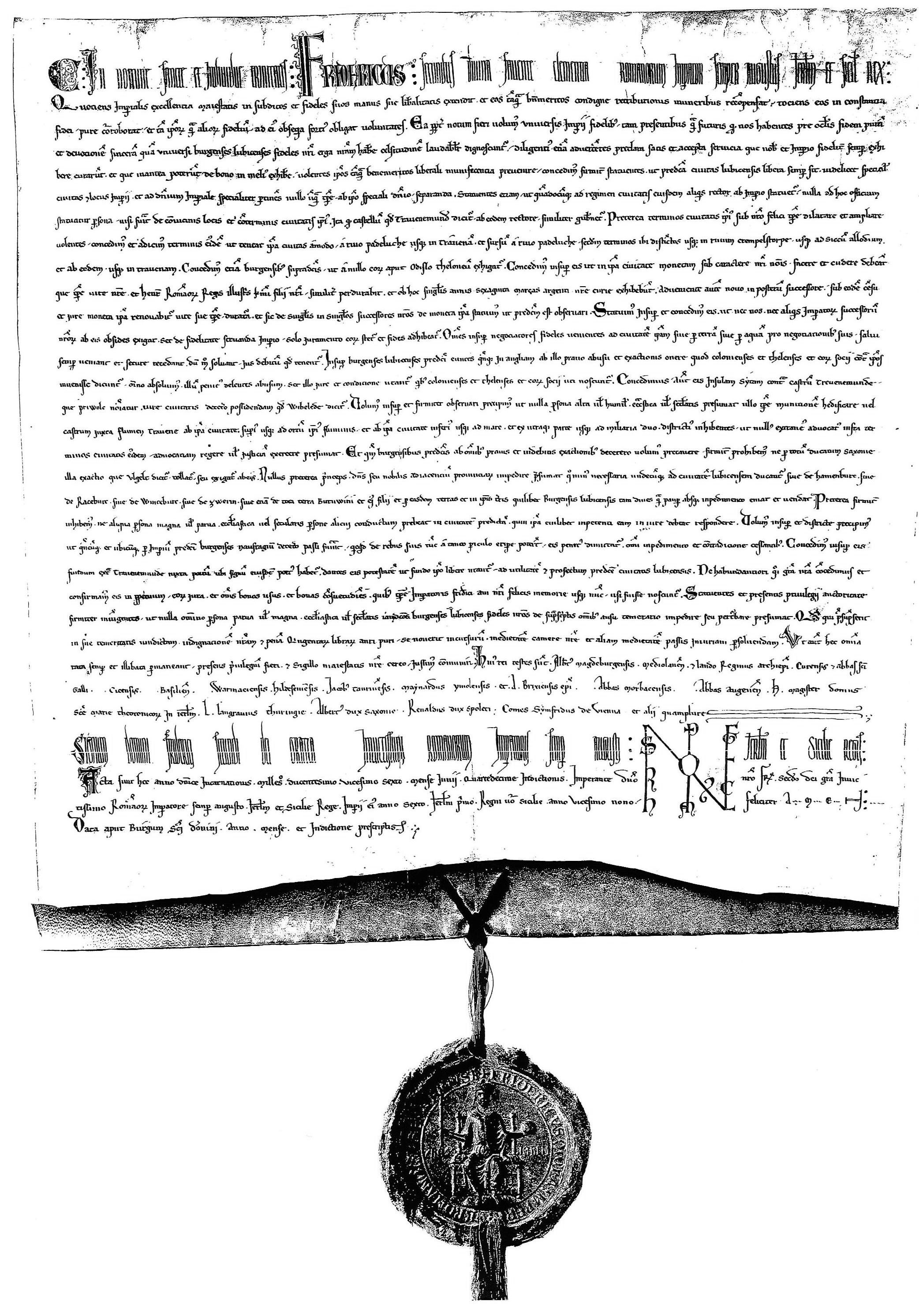 s/w Scan des Reichsfreiheitsbriefes der Hansestadt Lübeck, gegeben von Kaiser Friedrich II. zu Borgio San Donnino (Italien) in der Wachssiegelversion (im Gegensatz zur weiteren Version mit Goldener Bulle)